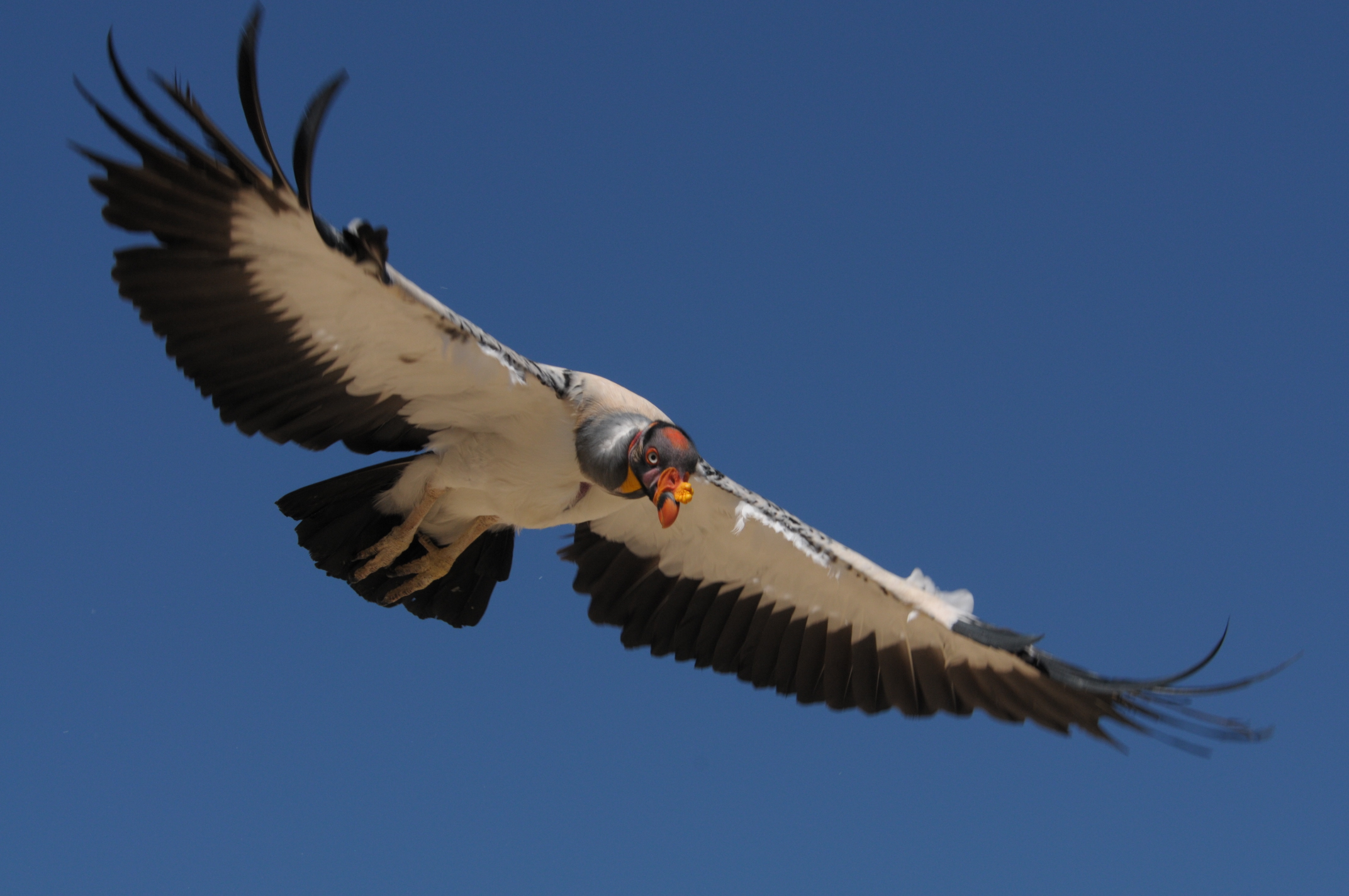 Urubu rei - Sarcoramphus papa